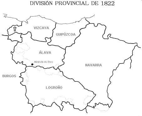 Divisió provincial de 1822. Detalle de Vascongadas, La Rioja y Navarra